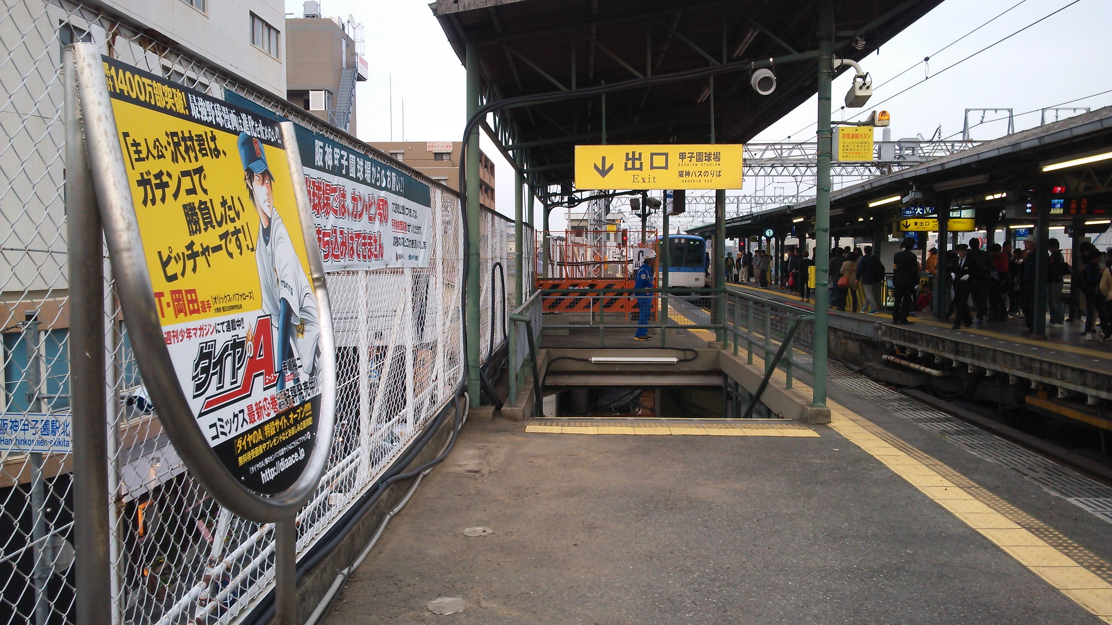 高校野球開催期間中のみ掲出される、阪神甲子園駅降車ホームの「ダイヤのA」の広告看板